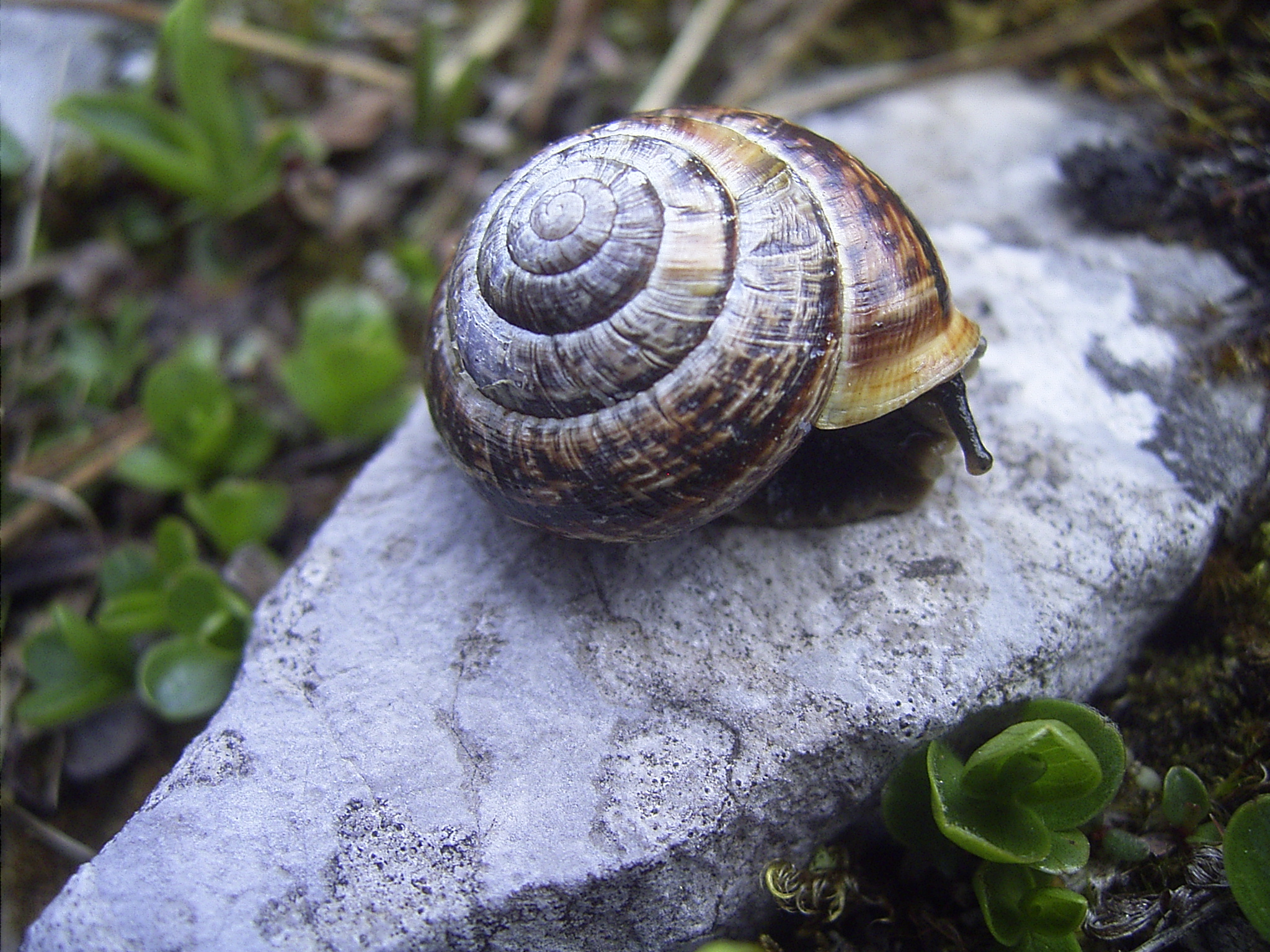 Arianta arbustorum at Rax, Austria, June 2006.